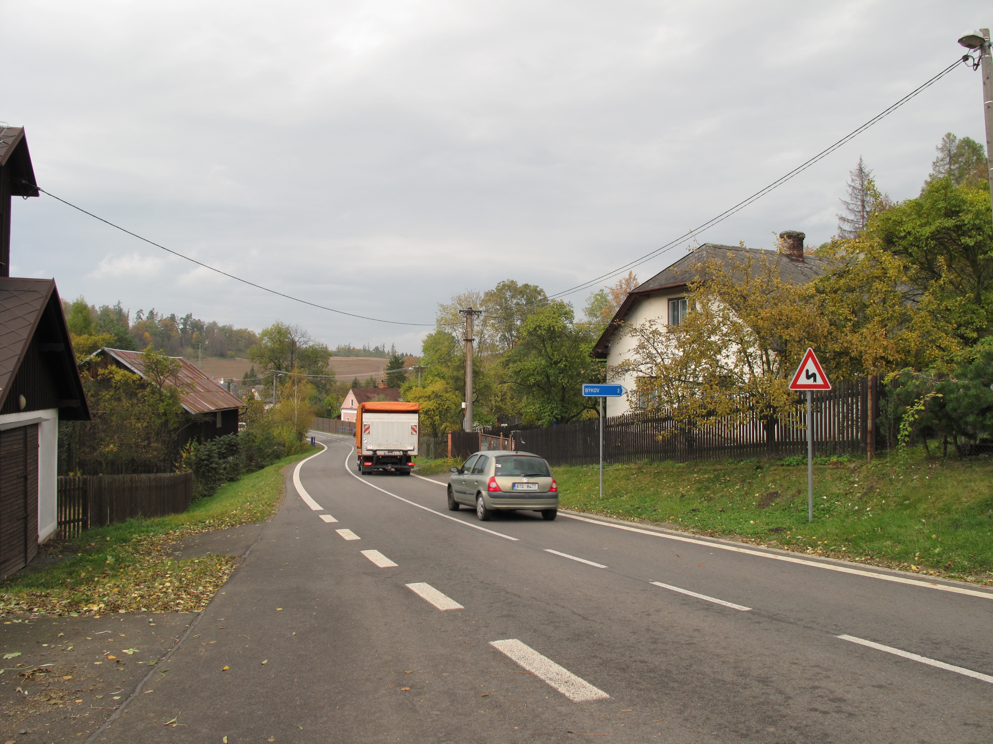 Láryšov. Okres Bruntál, Česká republika.